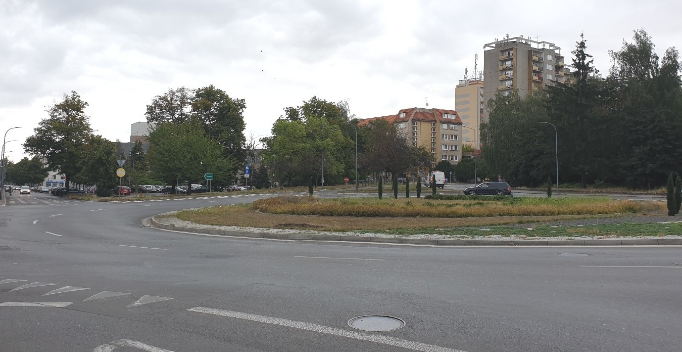 Stargard. Rondo, Plac Wolności